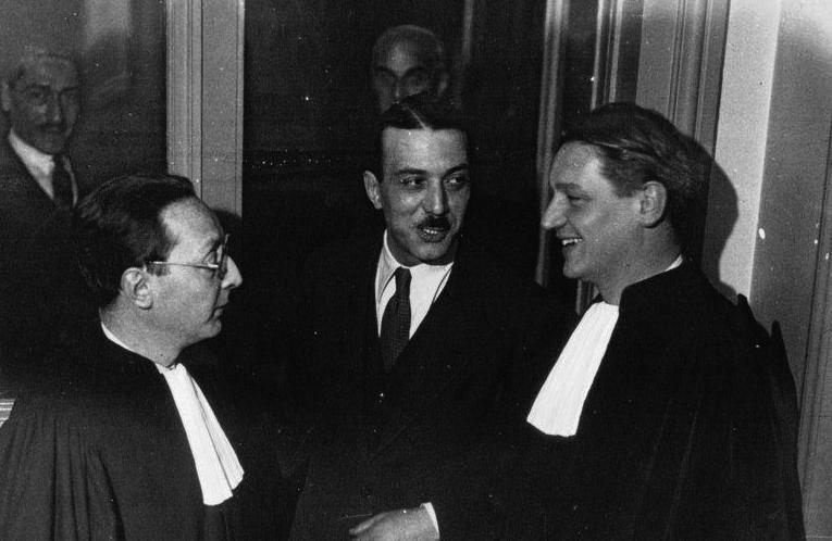 Pierre Bonny (au centre) et ses avocats du procès Gringoire, Edmond Aaron (à gauche) et Philippe Lamour, en novembre 1934.